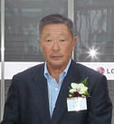 LG전자는 10일 오전 인천광역시 서구 경서동에 위치한 「LG전자 인천캠퍼스」 준공식을 개최했다. 사진은 「LG전자 인천캠퍼스」 준공식에서 윤상직 산업통상자원부 장관(좌측 일곱번째부터), 구본무 LG 회장, 송영길 인천시장, 구본준 LG전자 부회장이 테이프 커팅을 하고 있다. ※ LG전자 뉴스룸 에서 관련 보도자료를 확인하실 수 있습니다.